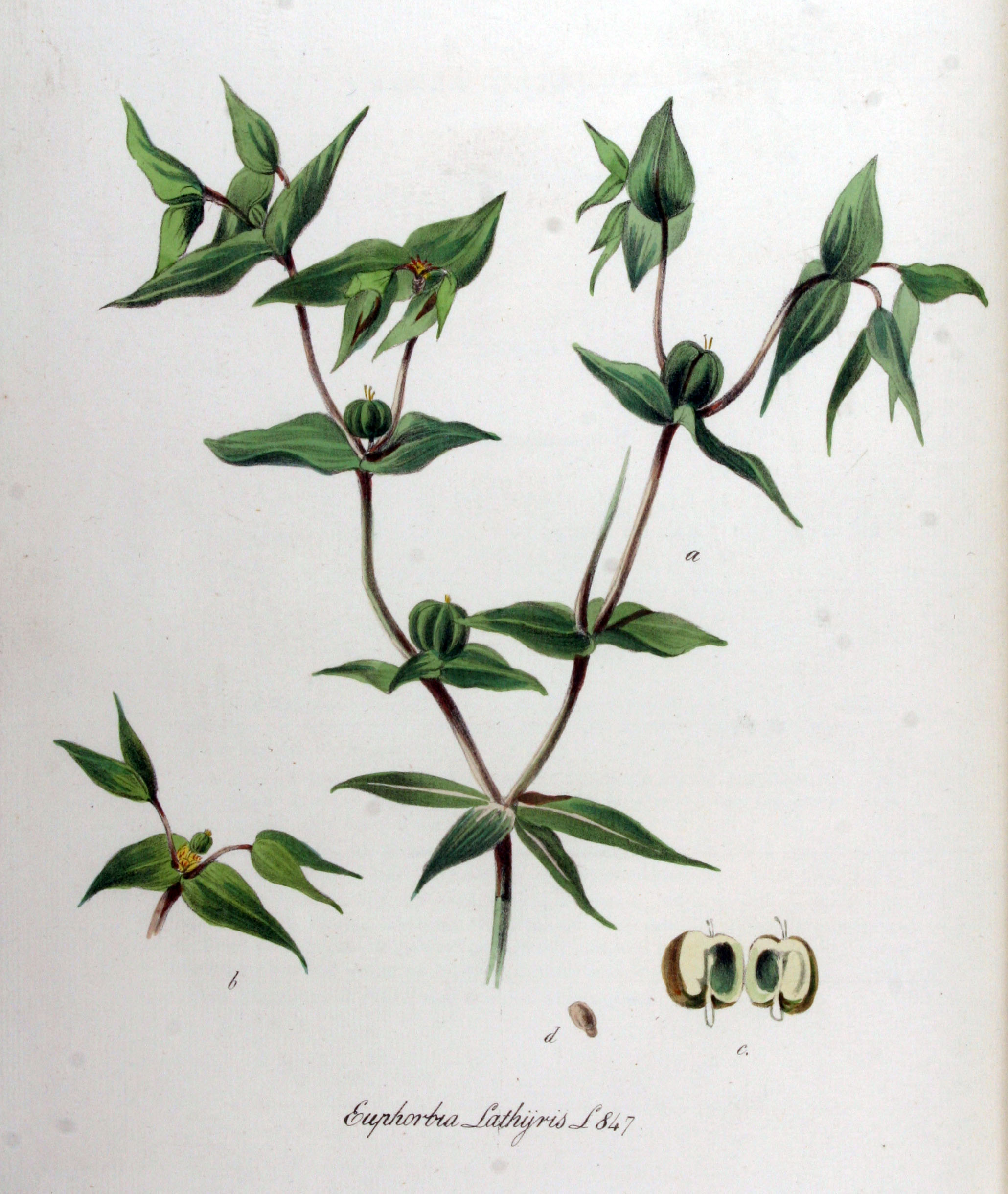 Euphorbia lathyris L. (Syn. Tithymalus lathyris (L.) Hill)